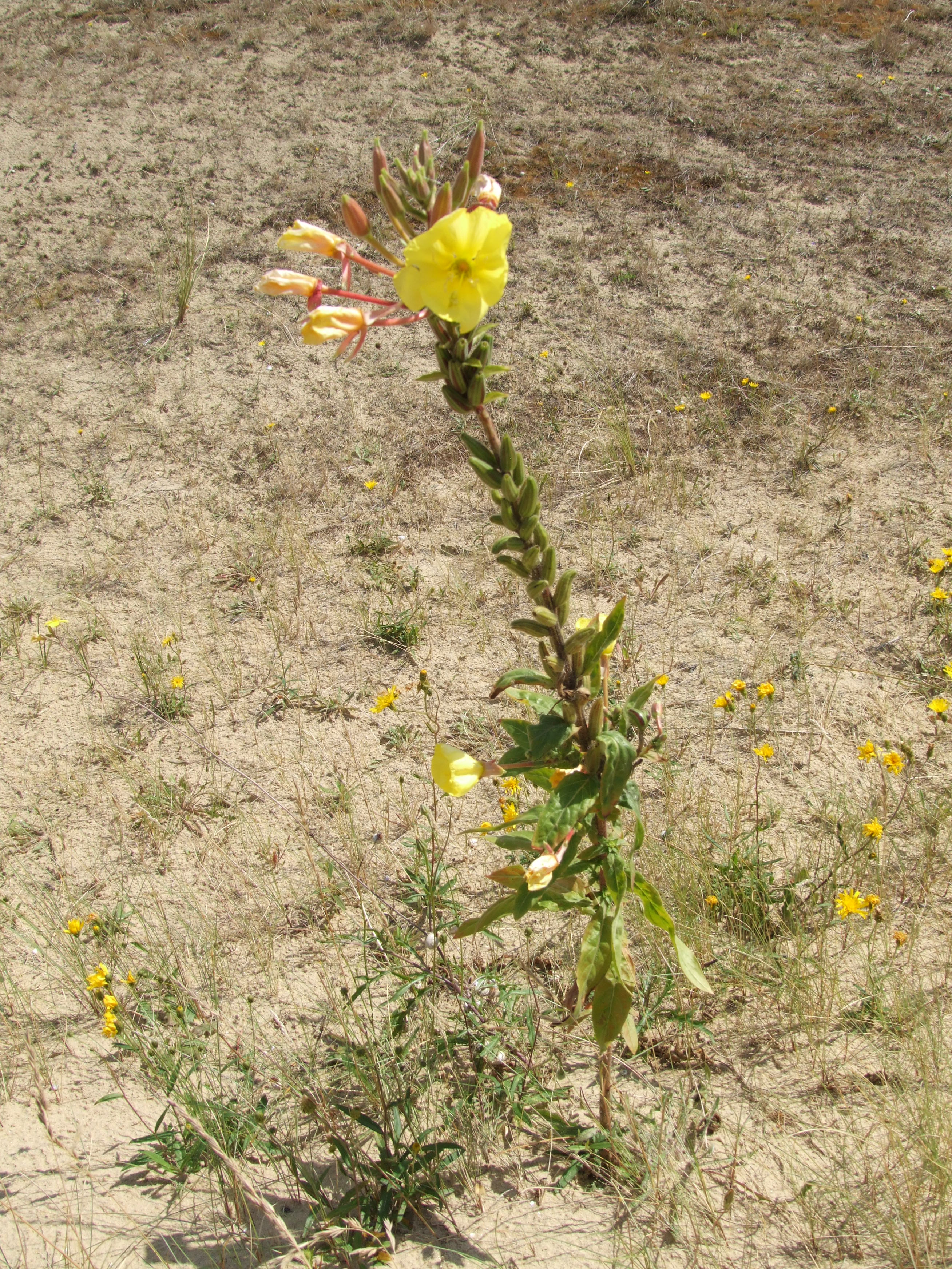 Oenothera erythrosepala - Große Nachtkerze - Grote teunisbloem - l'Onagre à sépales striés de rouge - Evening Primrose - Ort: Dune du Perroquet, Bray-Dunes, Frankreich